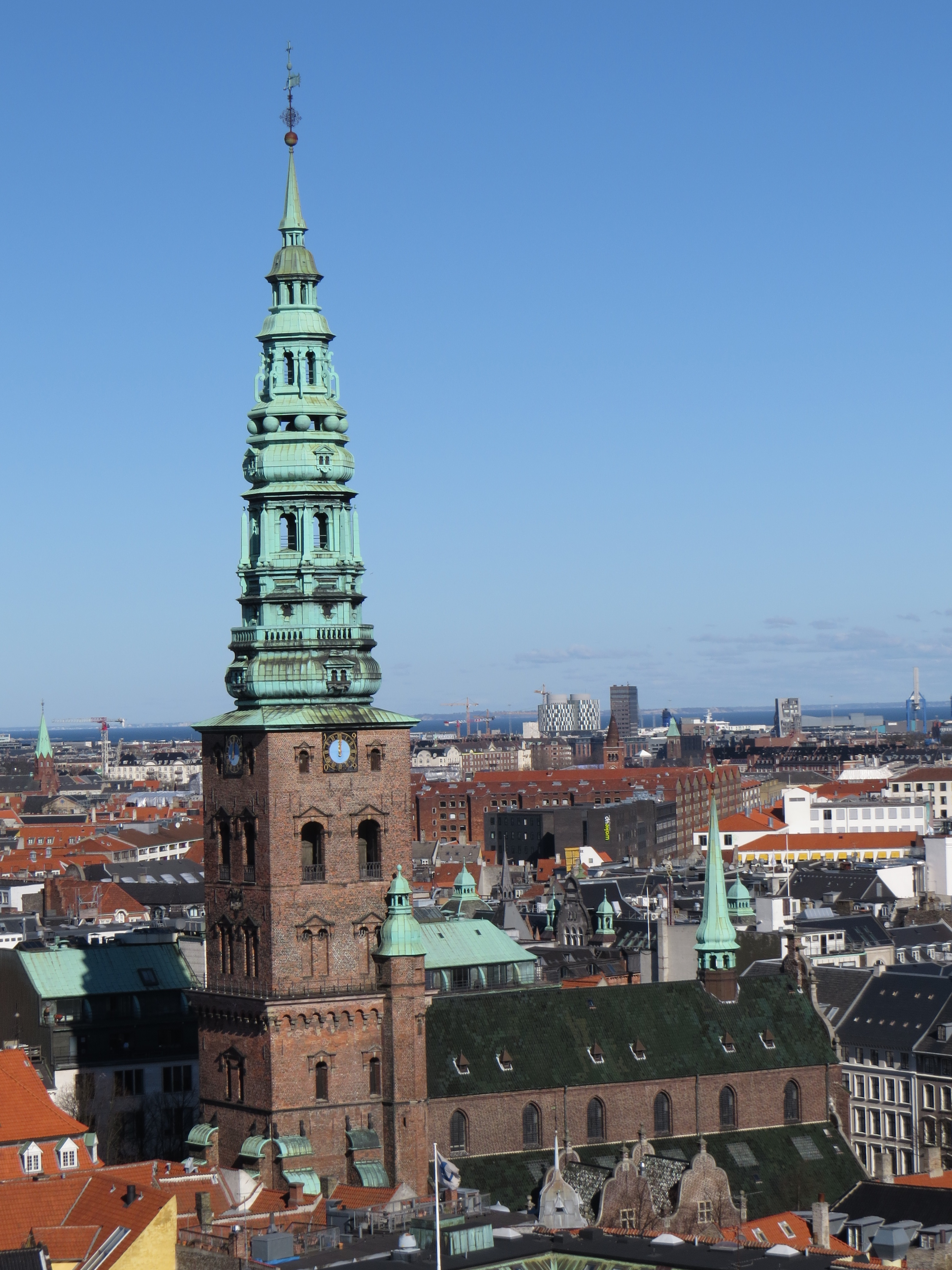 Nicolai Kirke, København